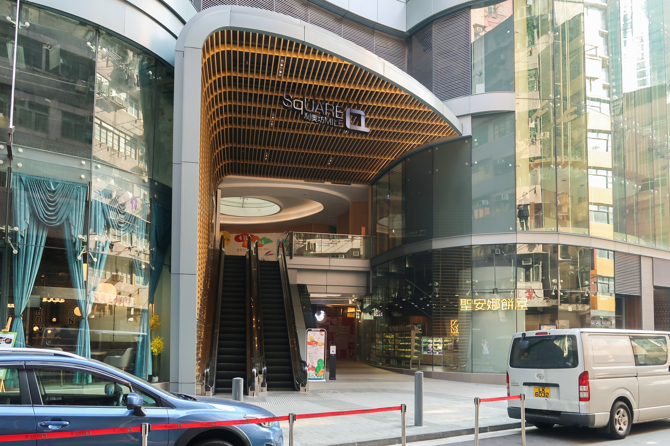 Square Mile Q Entrance